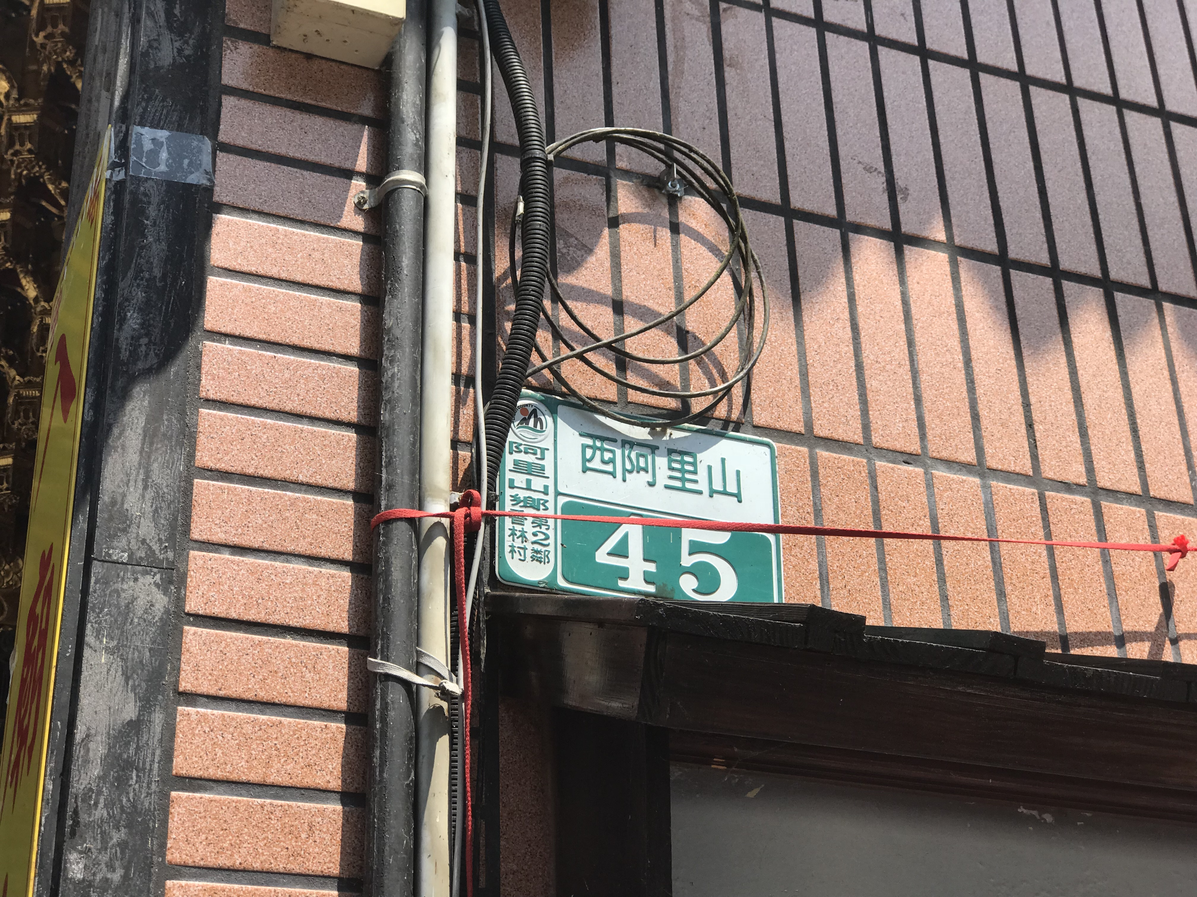 阿里山受鎮宮門牌